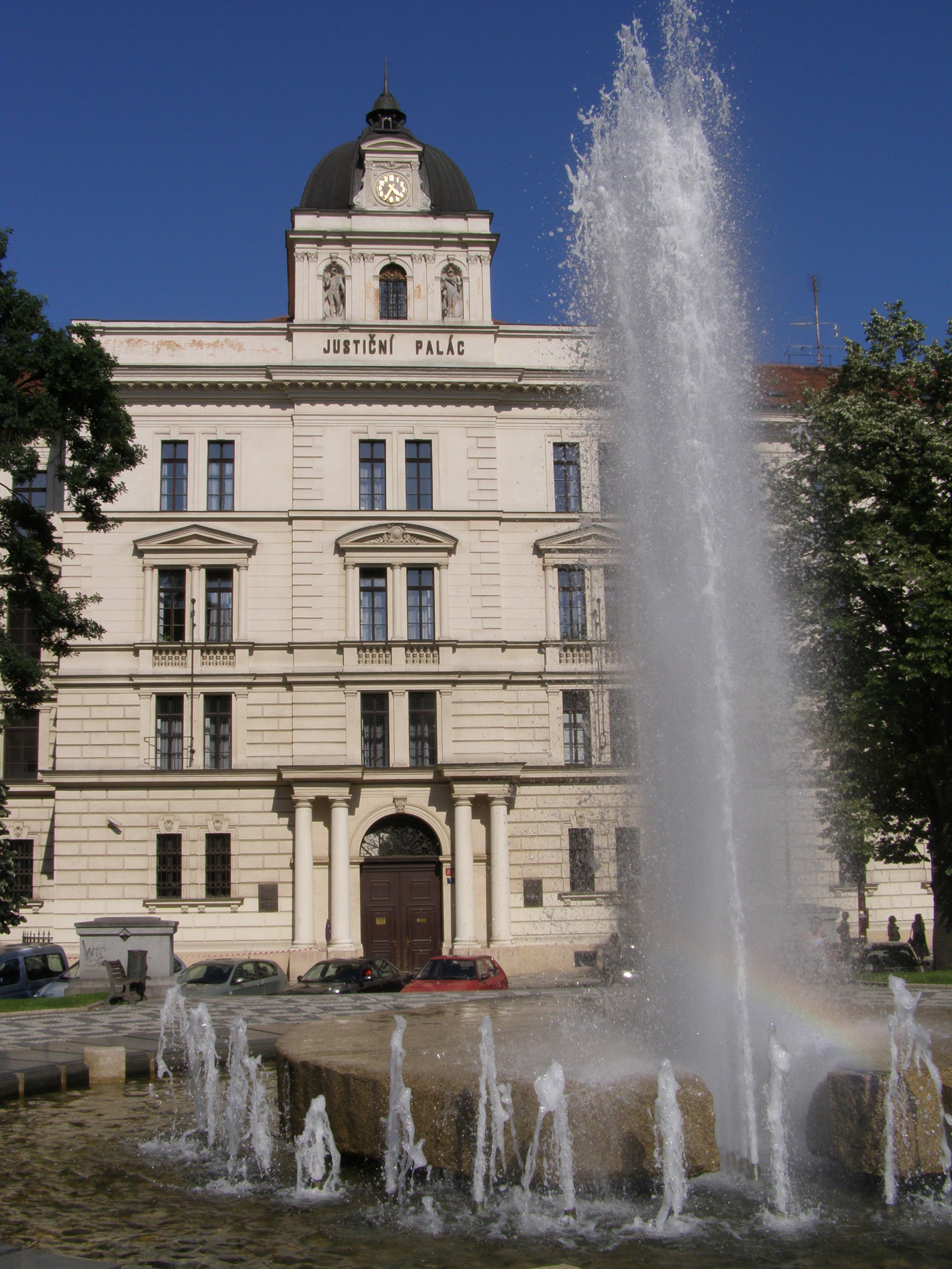 Praha, Smíchov, Náměstí Kinských, Justiční palác